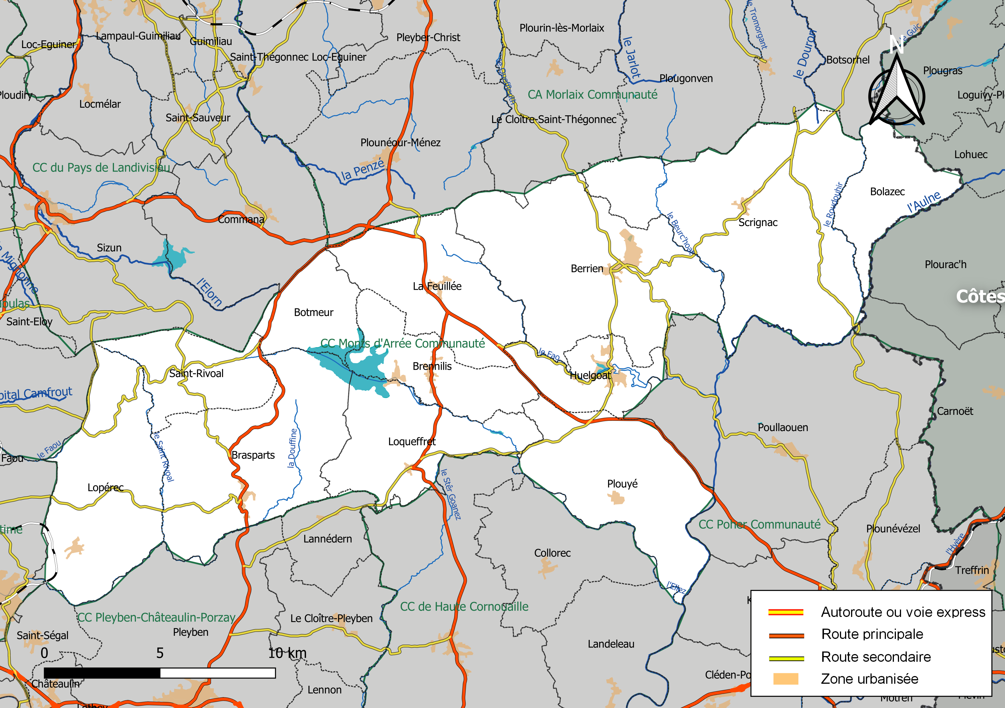 Carte géographique de la Communauté de communes Monts d'Arrée Communauté, département du Finistère, France. Composition au 1er janvier 2019.